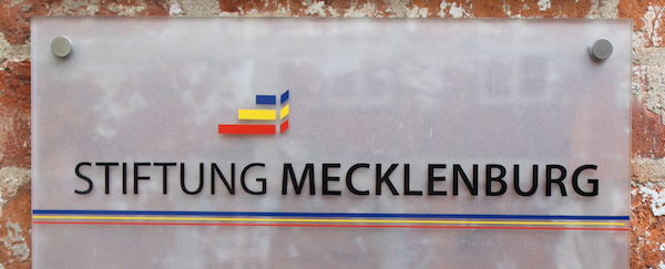 Logo der Stiftung Mecklenburg auf dem Schild neben dem Eingang zur Ausstellung in Schwerin